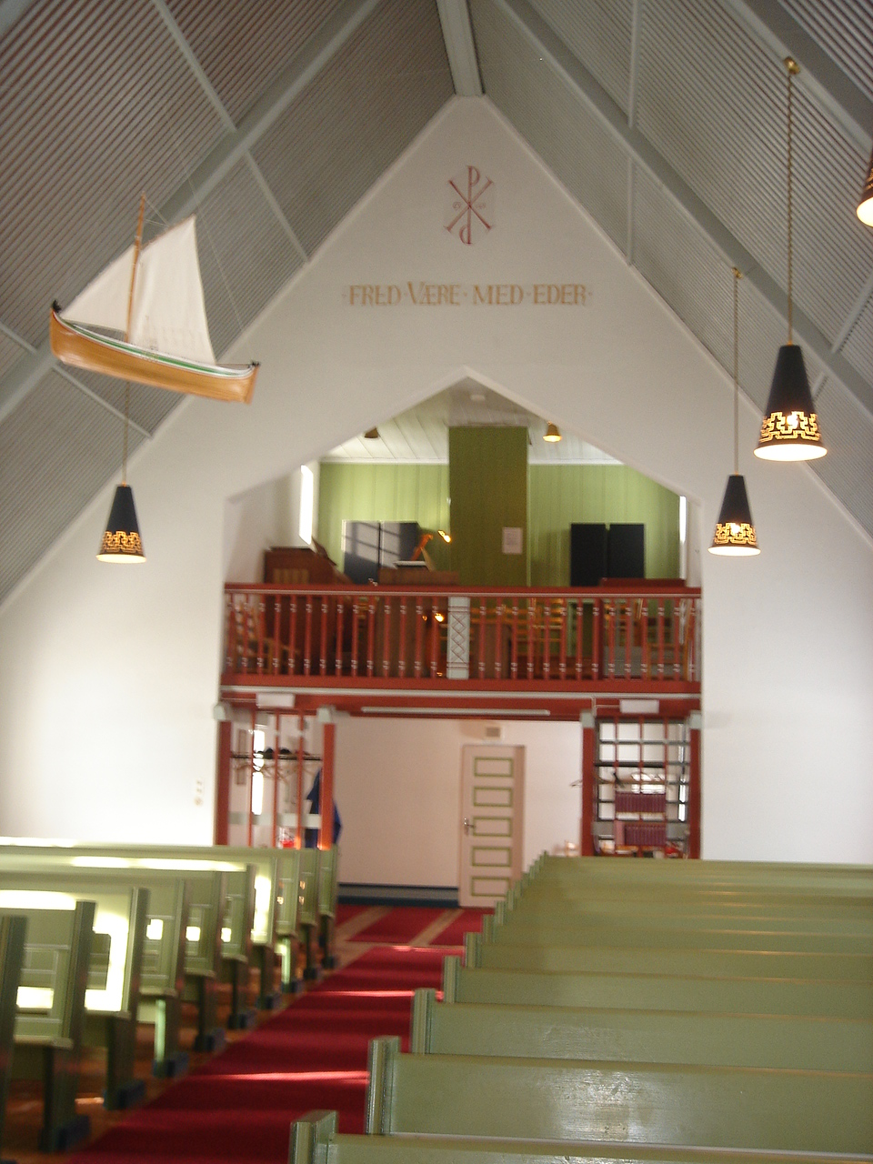 Gamvik kirke orgel, Organ in Gamvik Church